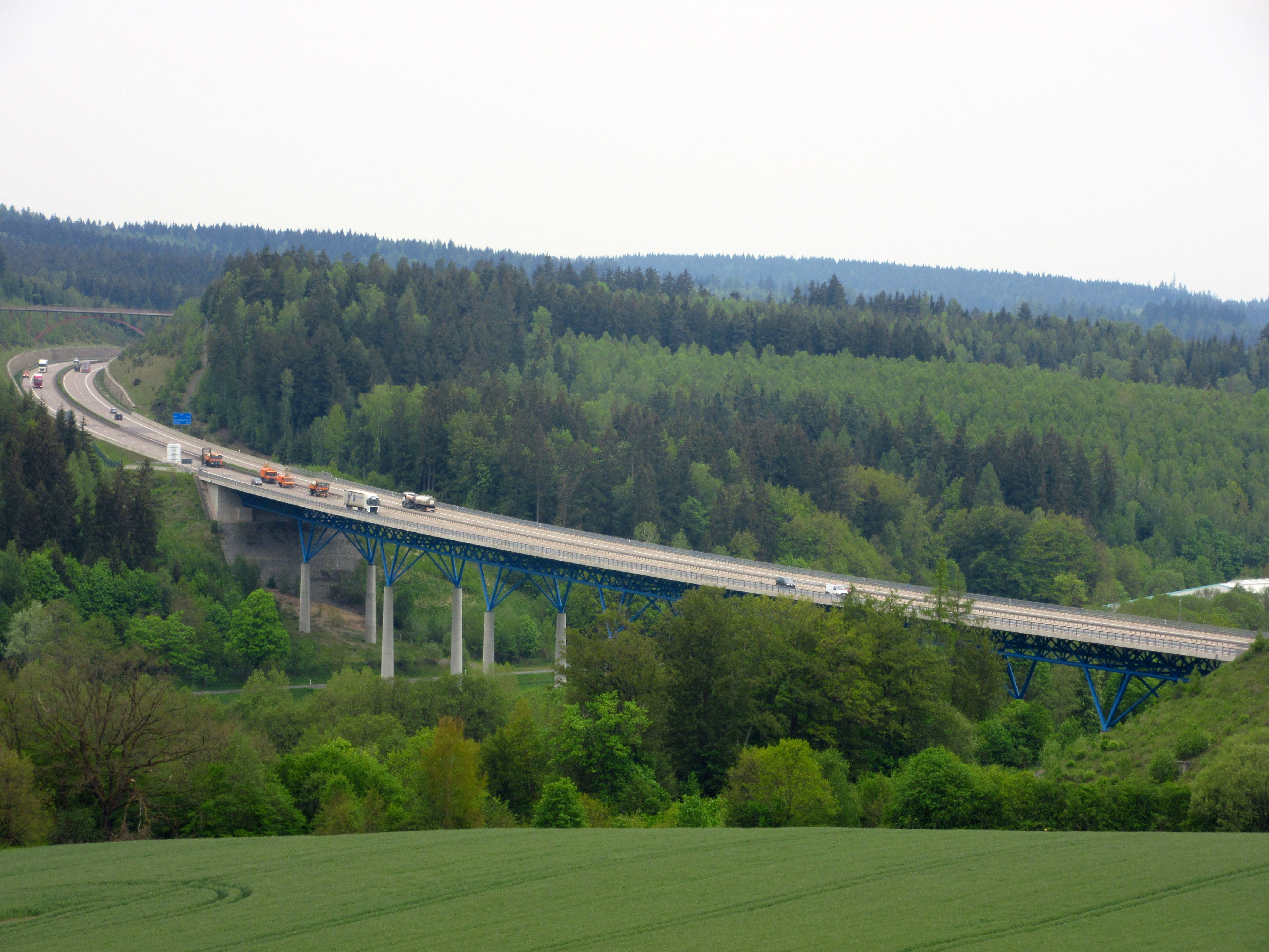 BAB73 Talbrücke St. Kilian